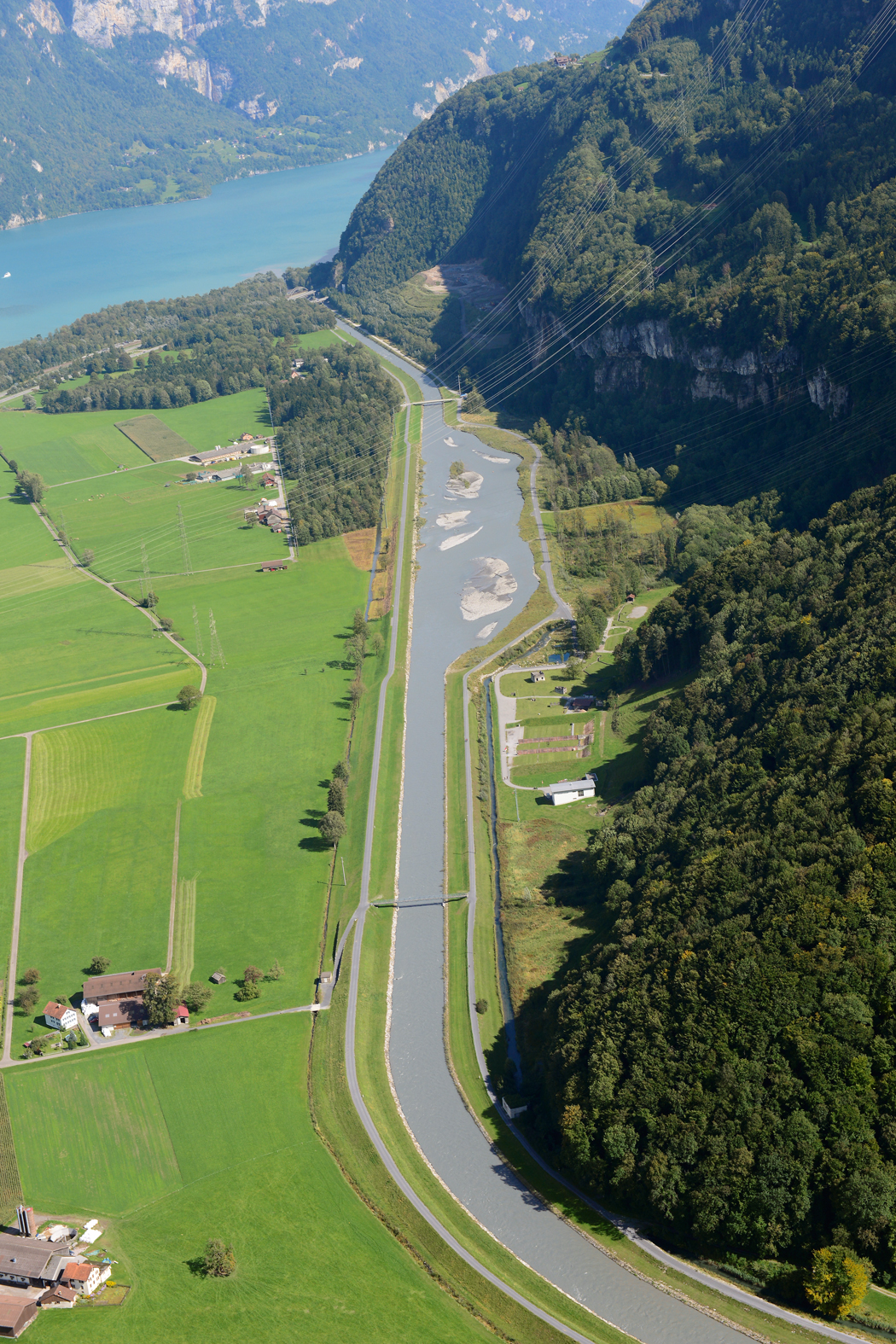 Im Chli Gäsitschachen steht der Linth ein breiteres Flussbett zur Verfügung.